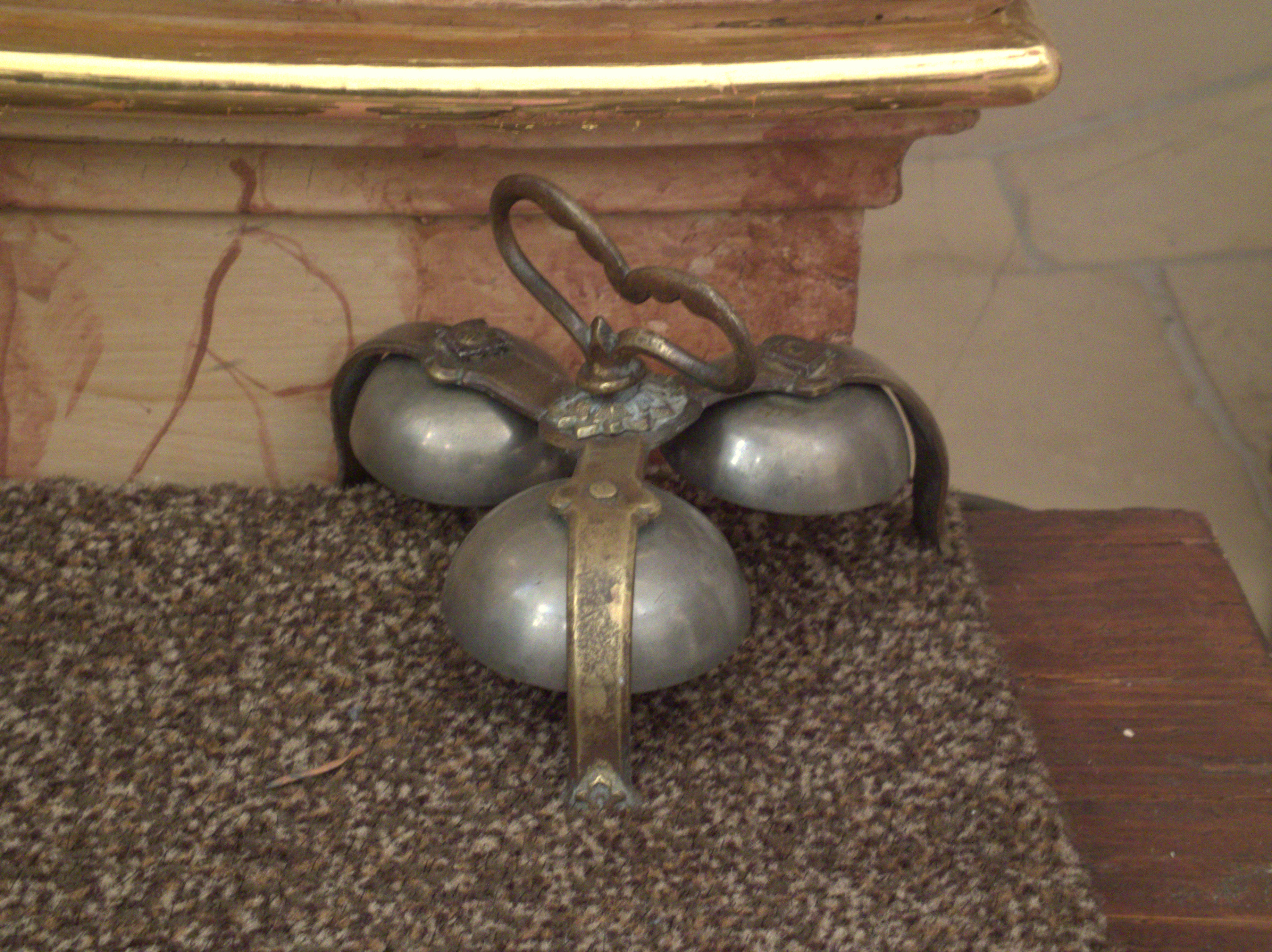 Das Franziskanerkloster im Oberpfälzischen Freystadt